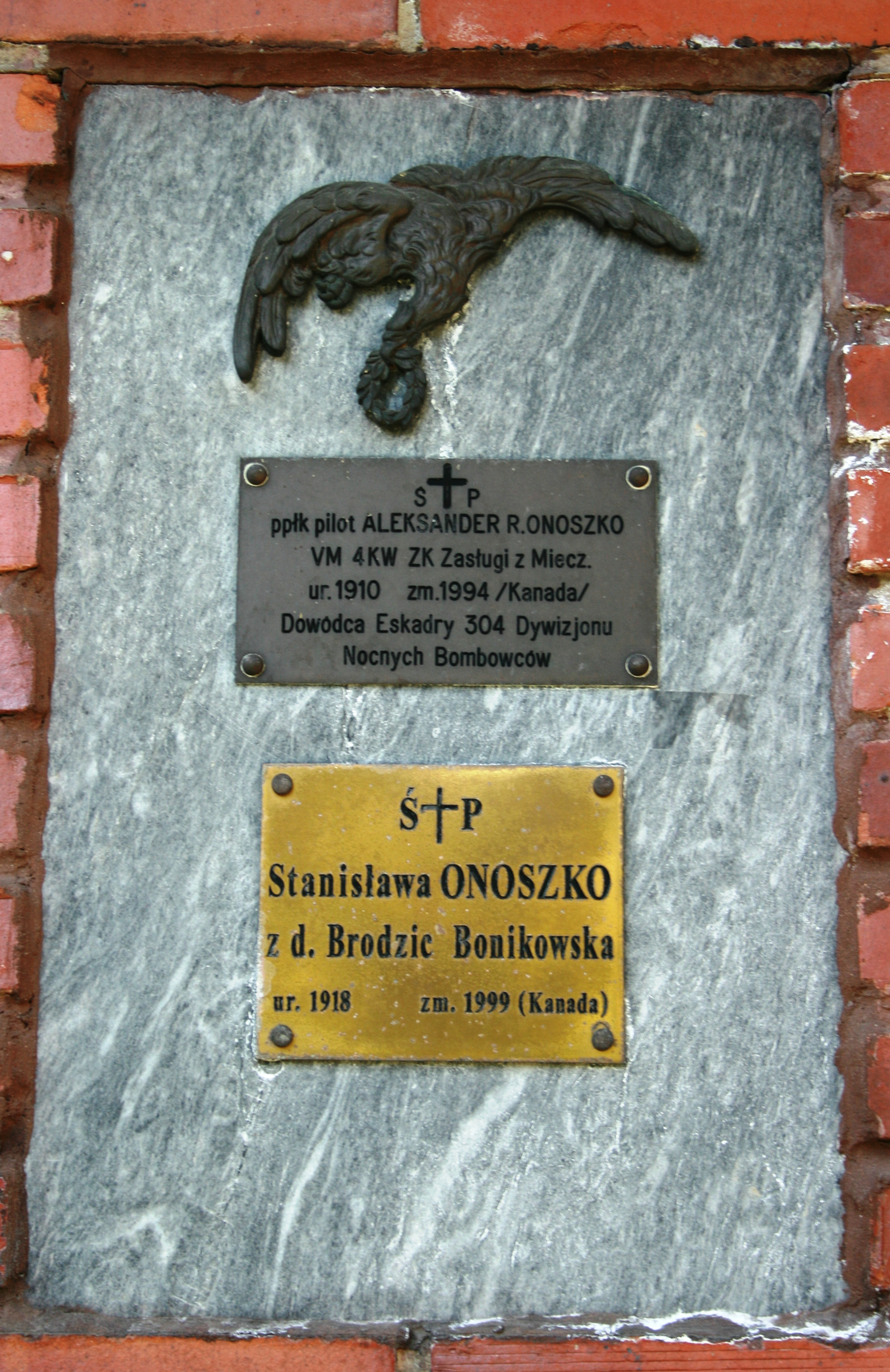 Kwatera Pierwszej Samodzielnej Brygady Spadochronowej na Powązkach Wojskowych w Warszawie